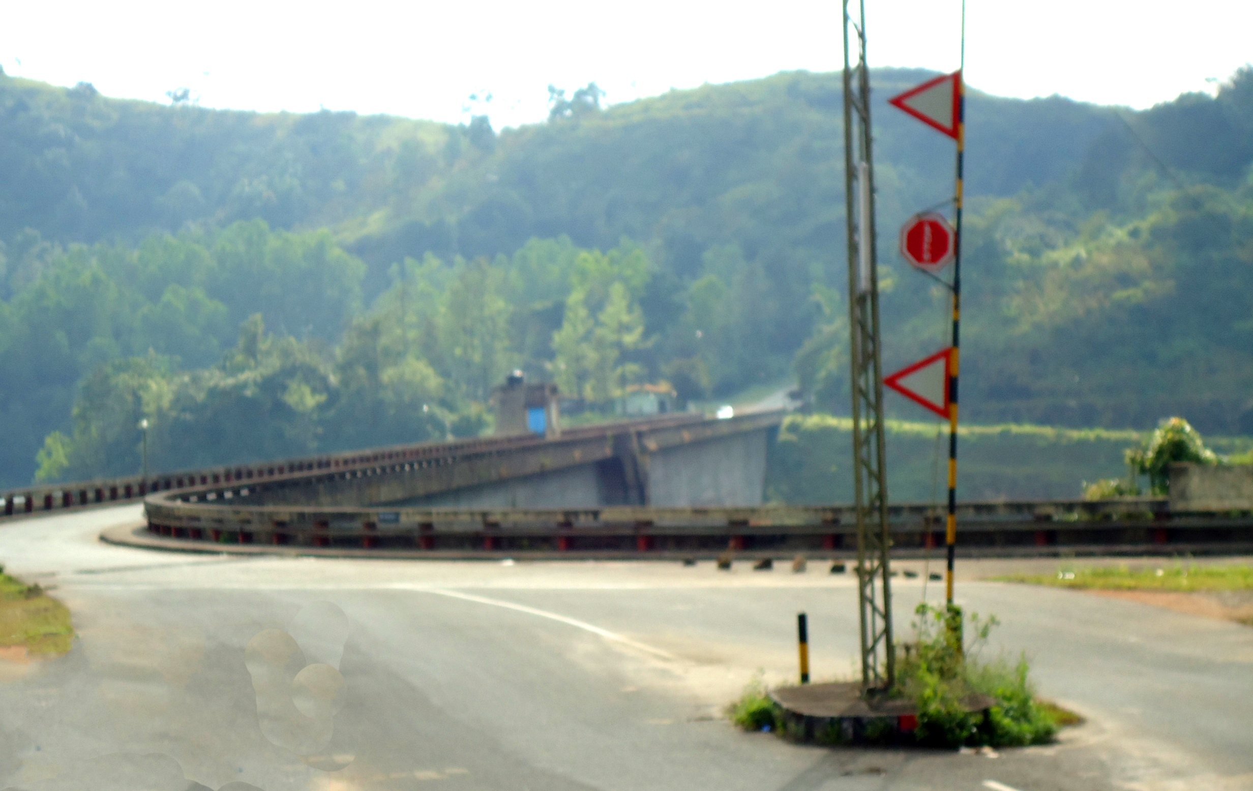 Kulamavu_Dam